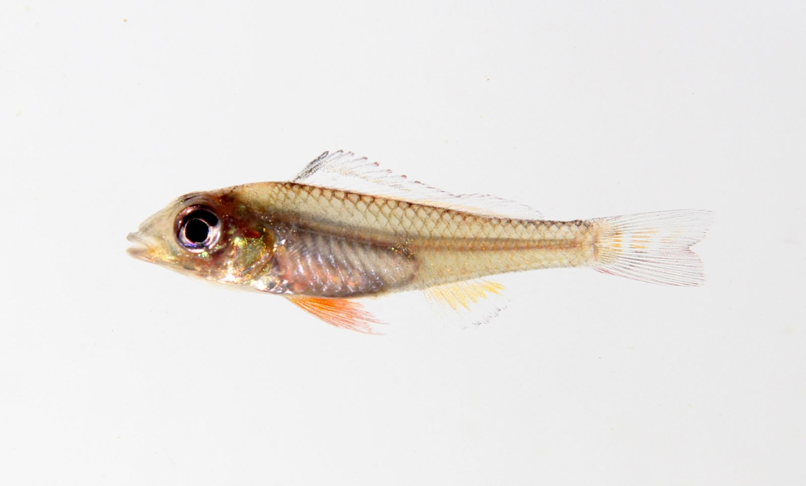 Biotecus opercularis